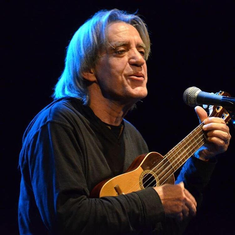 LUIS PASTOR en MORALEJA. El cantautor extremeño Luis Pastor actuará mañana sábado, 7 de mayo, en Moraleja. La cita es a las 21 horas en la Casa de Cultura. El concierto se enmarca dentro del ciclo "Con Voz Propia"